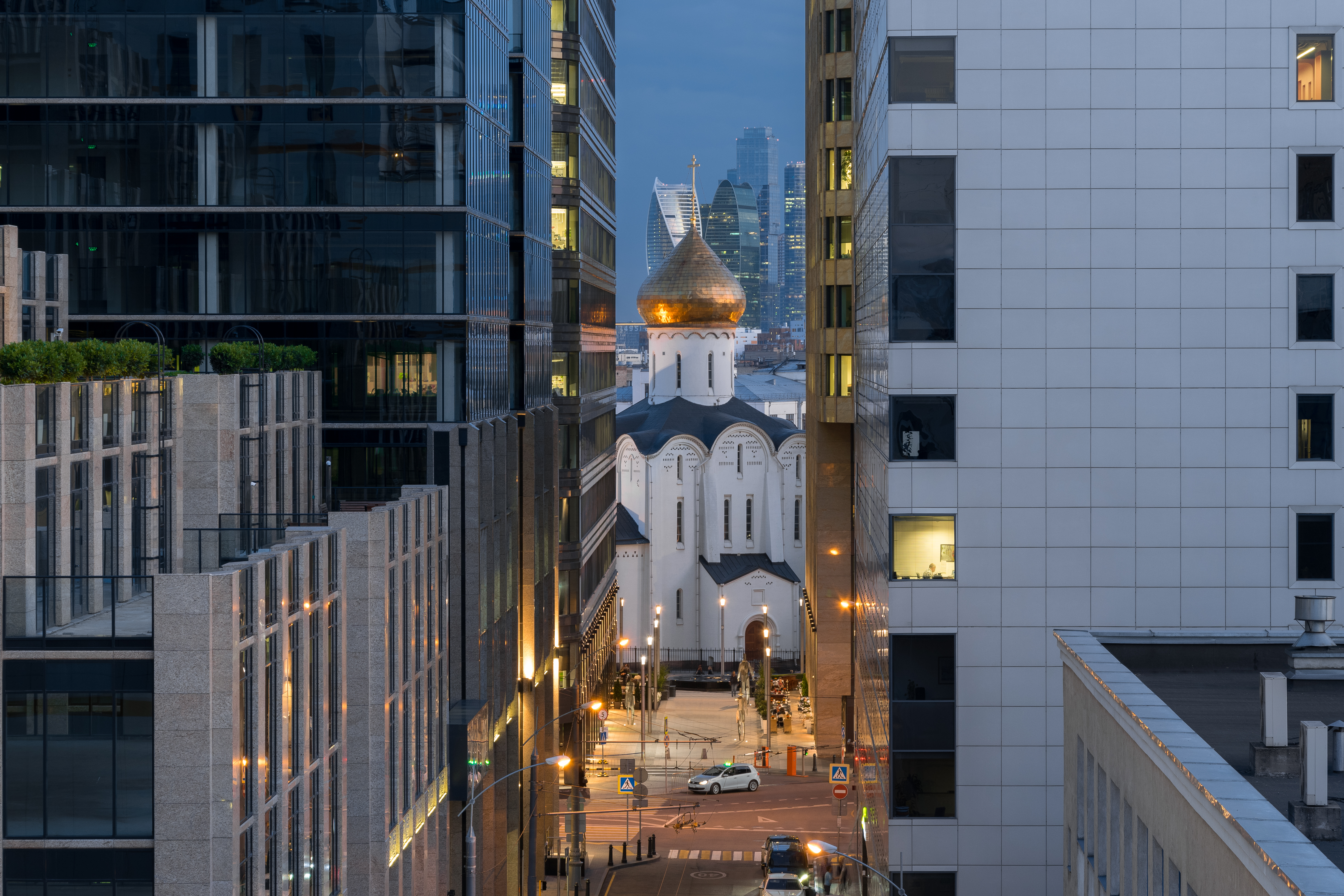 Церковь святителя Николая в Тверской старообрядческой общине: Бутырский Вал ул., дом 8/3, строение 1, Тверской, Центральный округ, Москва